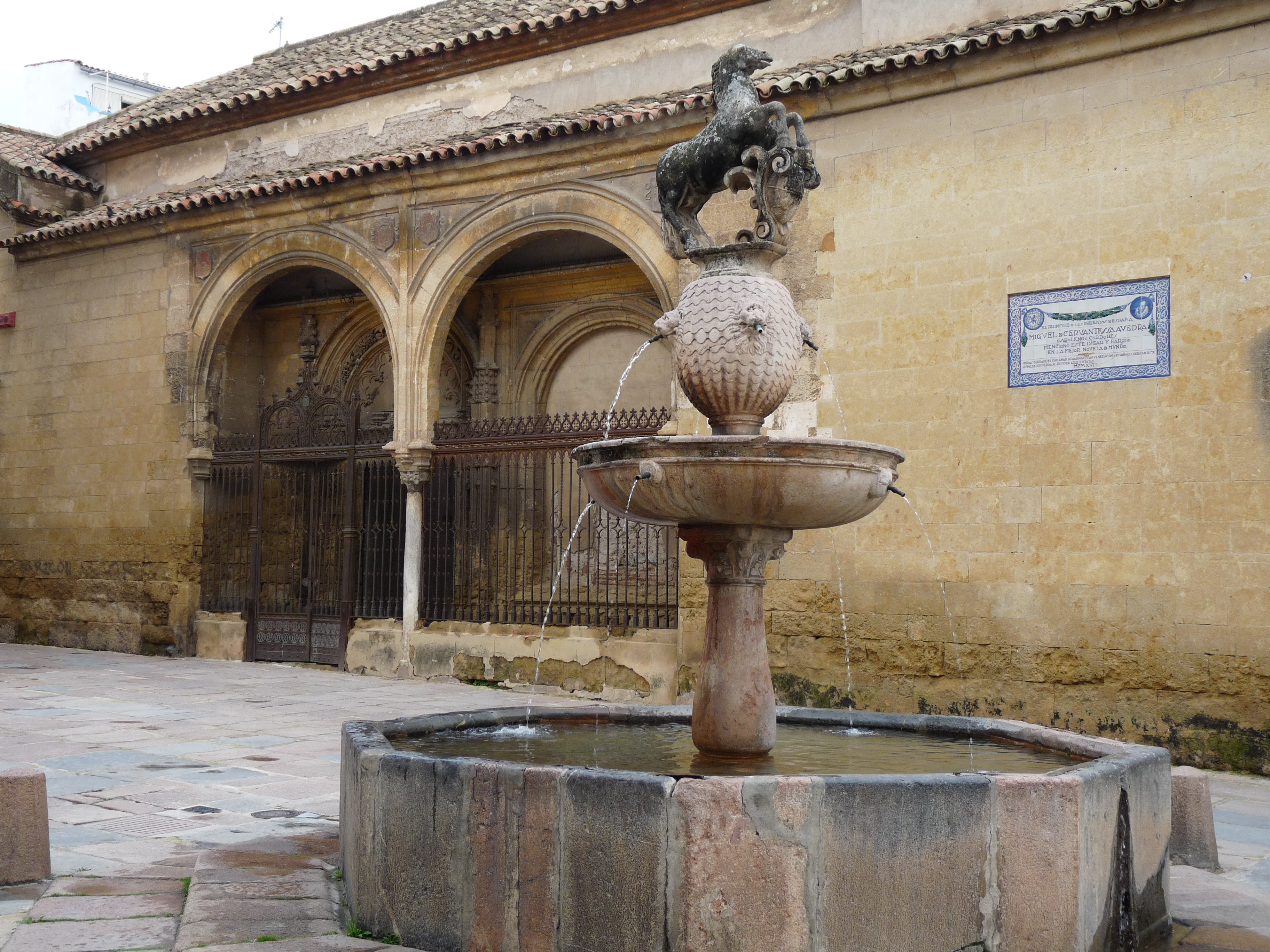 Plaza del Potro (Córdoba, España)